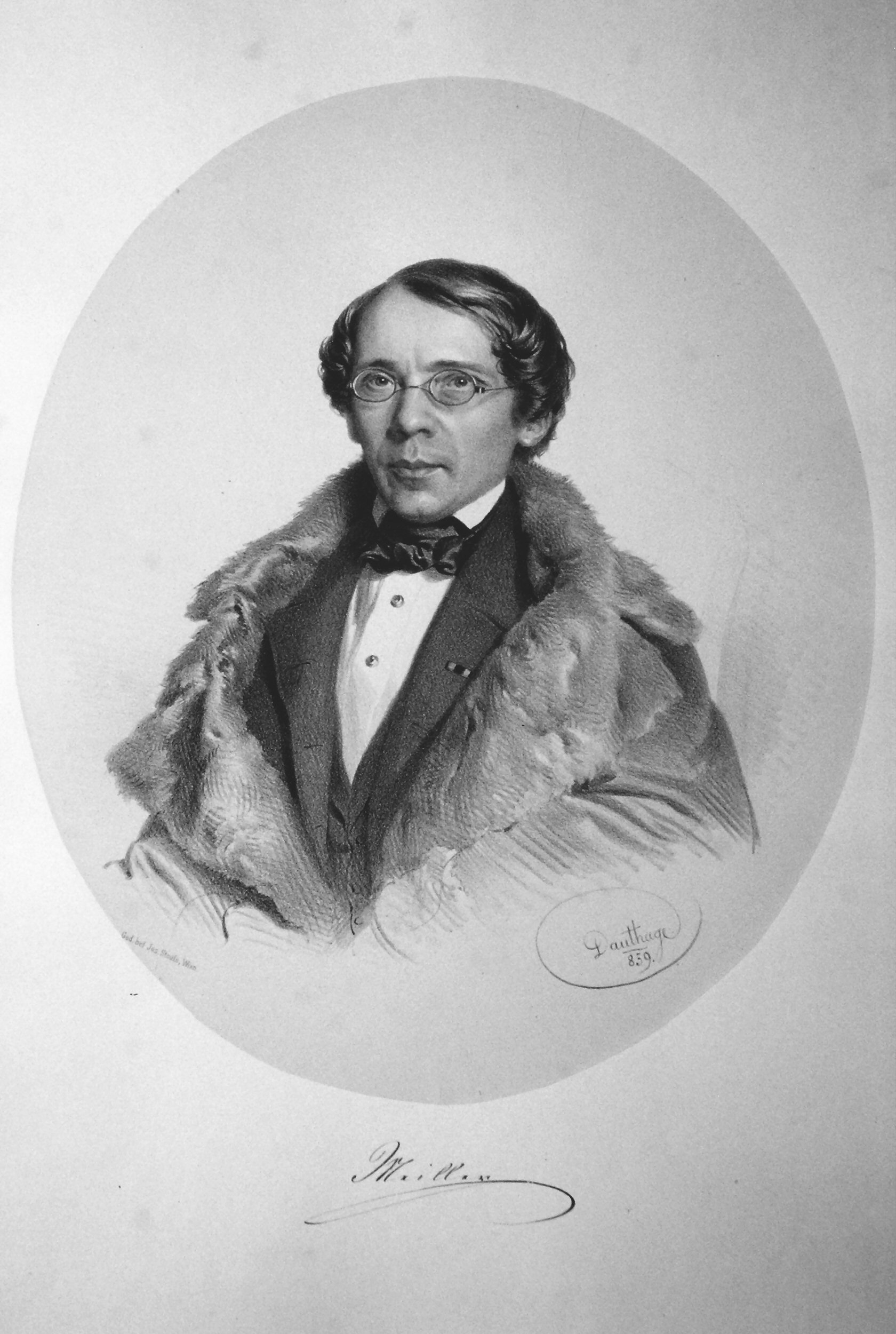 Andreeas von Meiller (1812-1871), österreichischer Archivar und Historiker. Lithographie von Adolf Dauthage, 1859